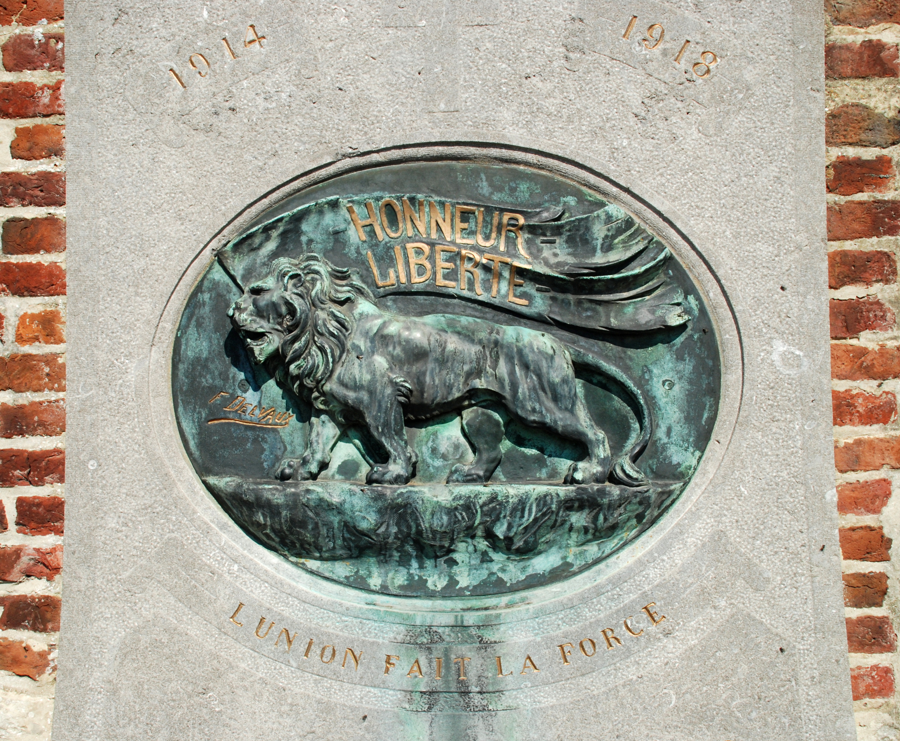 Belgique - Brabant wallon - Mont-Saint-Guibert - Église Saint-Pierre de Corbais